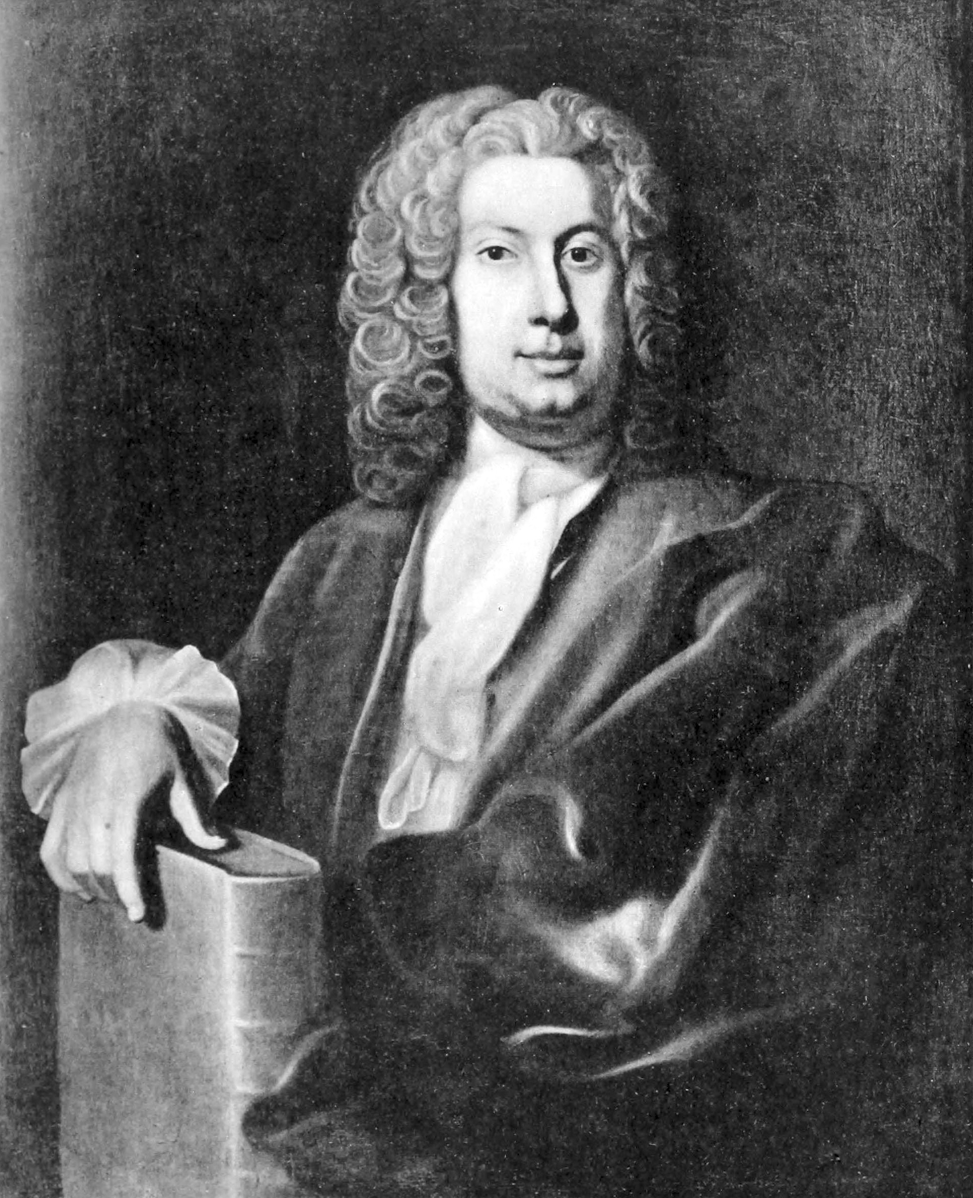 Evald Ribe (1701-1752). Medelålders man, bröstbild, fas, hufvudet något t. v., kroppen t. h., stöder högra handen mot en bok. Bruna ögon, mörka ögonbryn, fylligt ansikte,’ hvit peruk nedfallande till axlarna. Hvit lindad halsduk i enkel knut, de nedhängande ändarna instuckna i ett knapphål, kråsmanschetter. Blå i blåviolett skiftande sammetsrock utan krage med en rad klädda knappar, oknäppt. Öfver venstra axeln och bröstet brunt draperi. Mörk bakgrund. — På baksidan står: Evald Ribe Archiater & Præces ab anno 174- ad 1752. Olja på duk, 92 x 74Y* ctm, af Georg Engelhard Schröder. Medicinalstyrelsen. Eich. o 21.